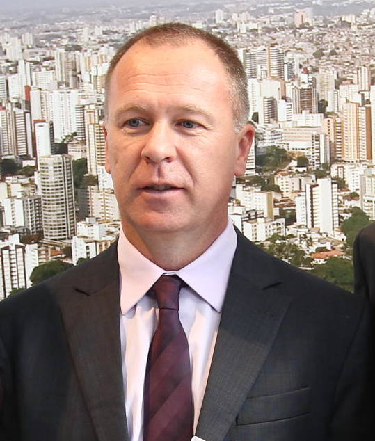 Governador Jaques Wagner participa do sorteio das eliminatórias da Copa do Mundo de 2014. Na foto: Fátima Mendonça, primeira dama da Bahia, Mano Menezes, técnico da seleção brasileira e Ney Campelo, secretário para assuntos da Copa 2014, no estande da Bahia. Foto Manu Dias / SECOM